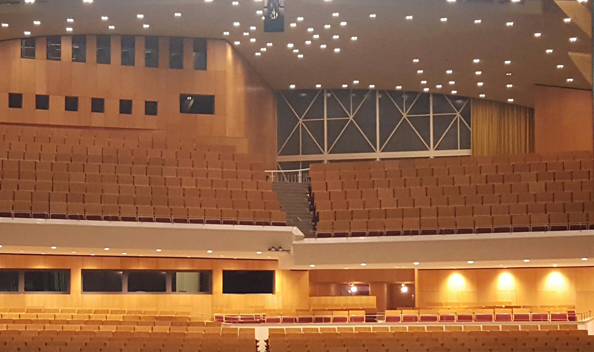 Zuschauerraum Theater Wolfsburg